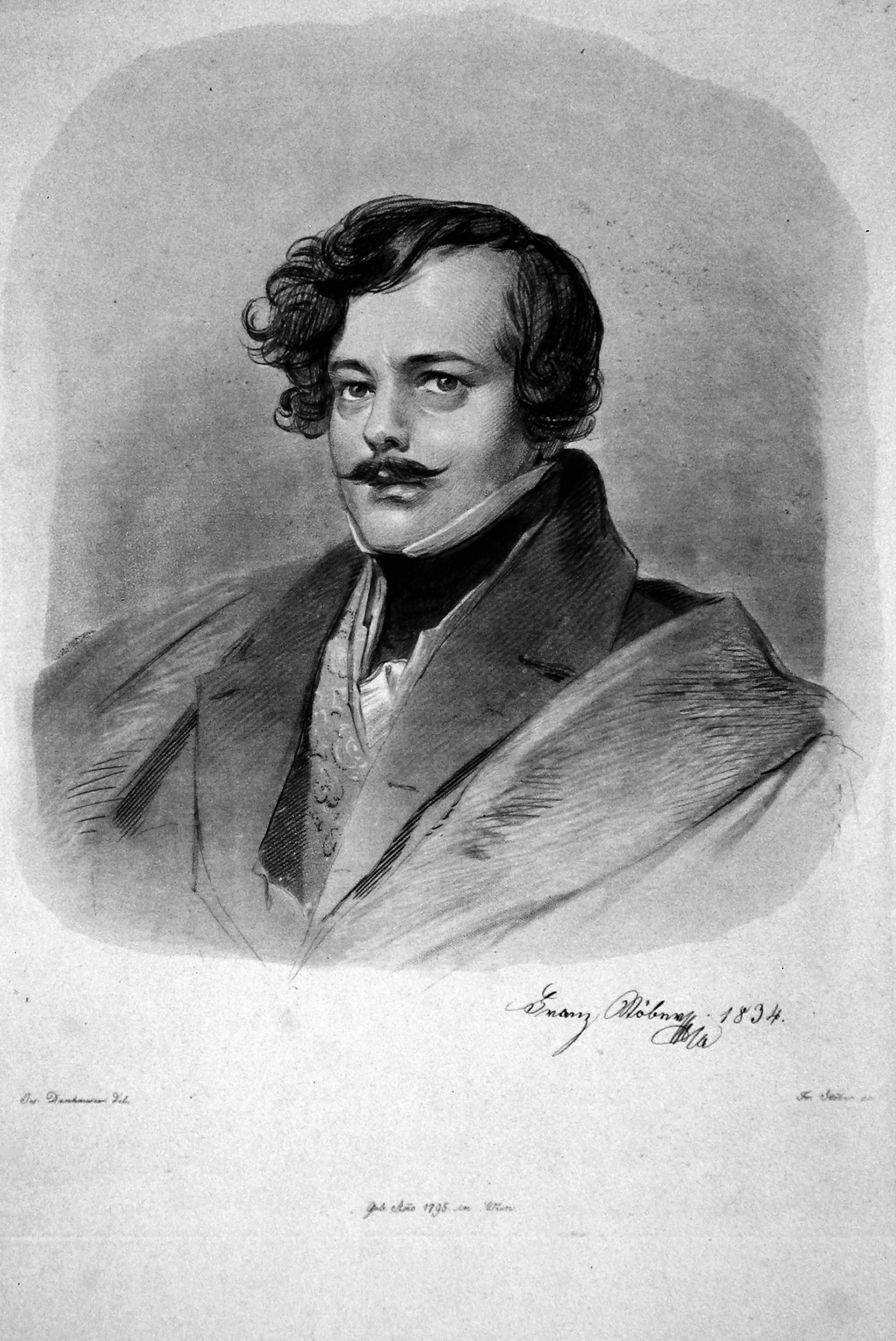 Franz Xaver Stöber, Selbstporträt, 18343, Stahlstich oder Radierung